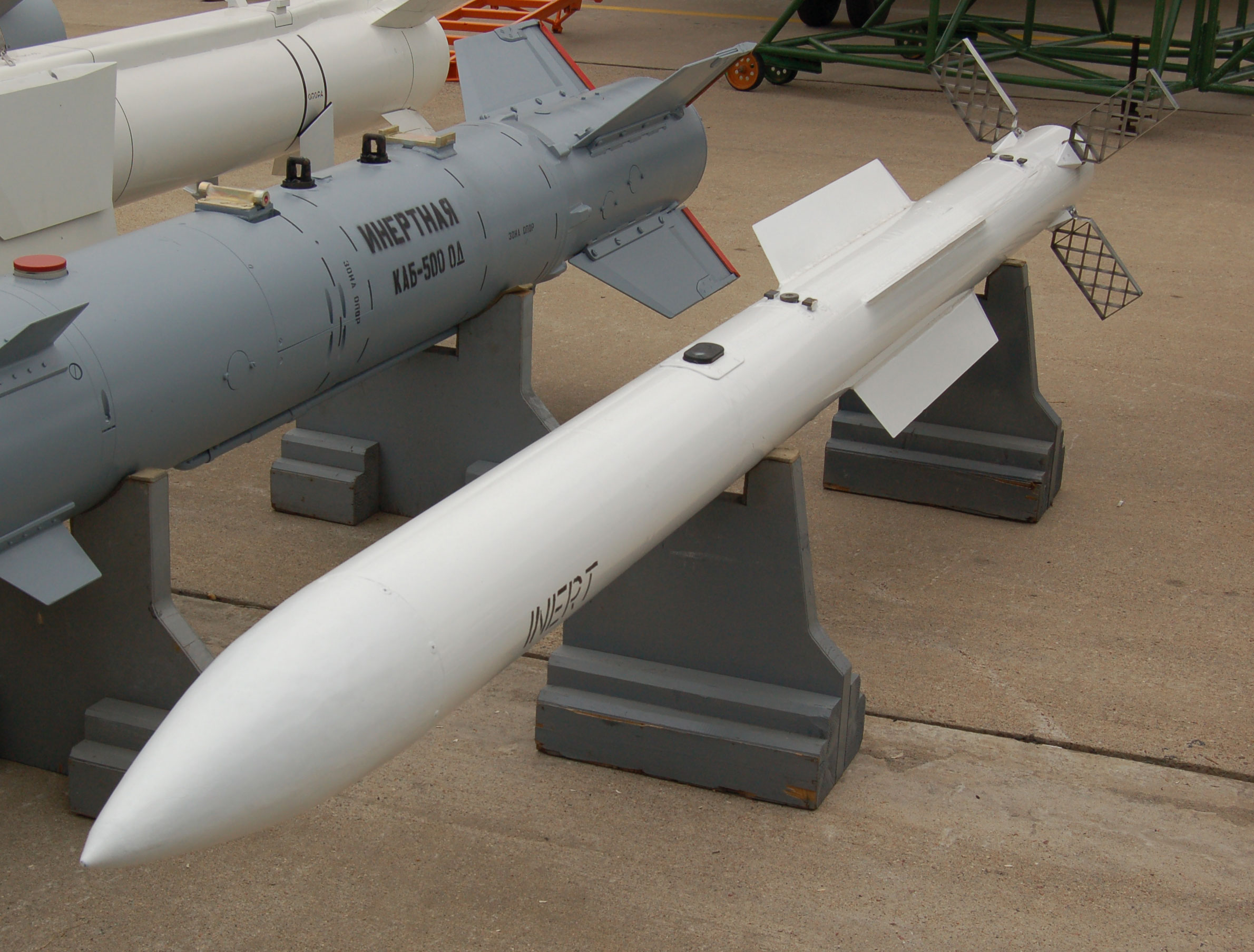 Ракета РВВ-АЕ (Р-77) на МАКС-2009.